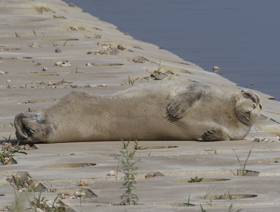 アゴヒゲアザラシ ナカちゃん 徳島県那賀川河口付近